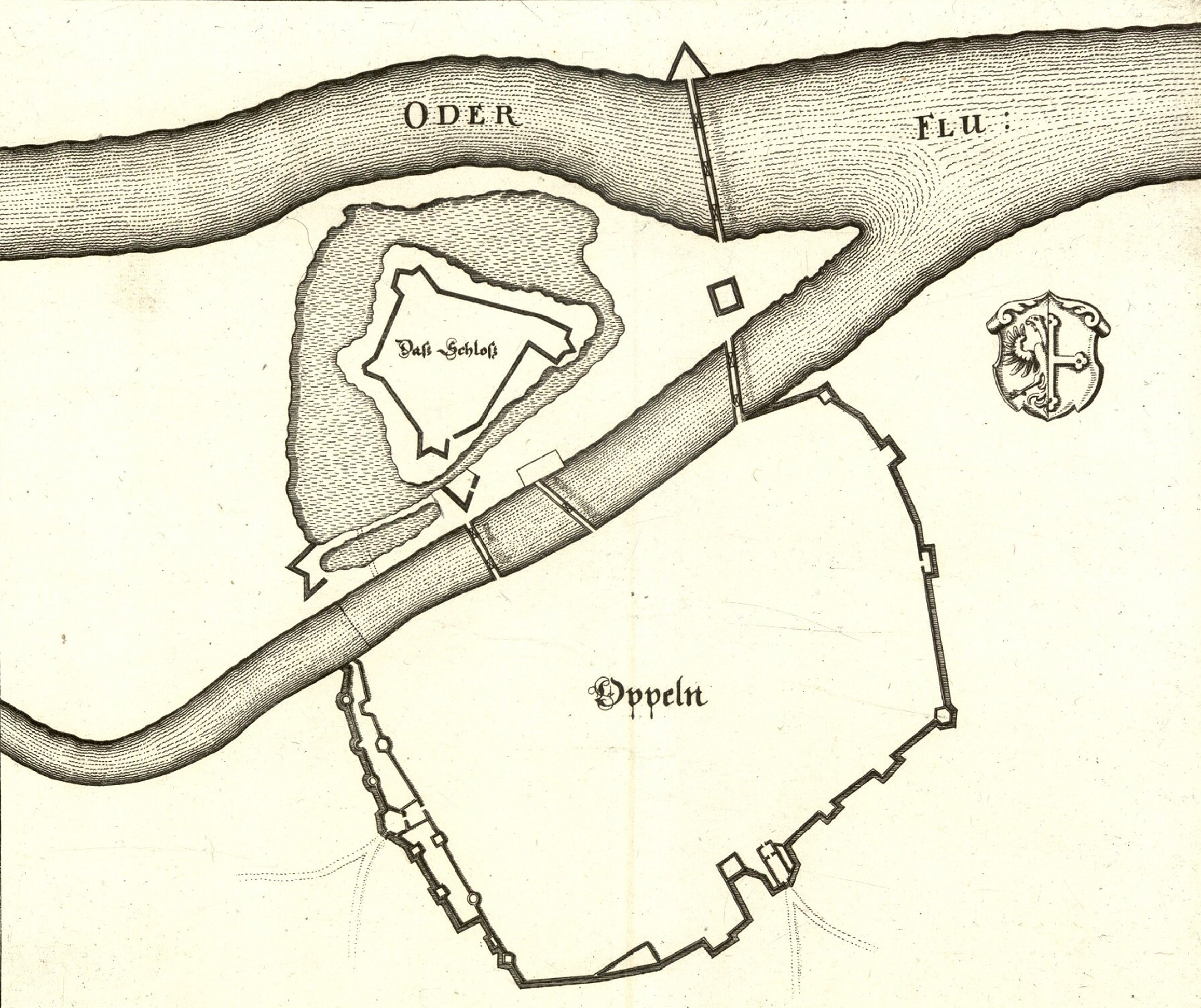 Miedzioryt przedstawiający zarys ówczesnego miasta z zaznaczeniem jego murów obronnych, łącznie z barbakanem po lewej stronie; oraz usytuowanie Zamku Piastowskiego, wówczas jeszcze otoczonego fosą. Miedzioryt został wykonany przez Matthäusa Meriana Starszego (1593-1650). Plan ze zbiorów Morawskiej Biblioteki Publicznej w Brnie.